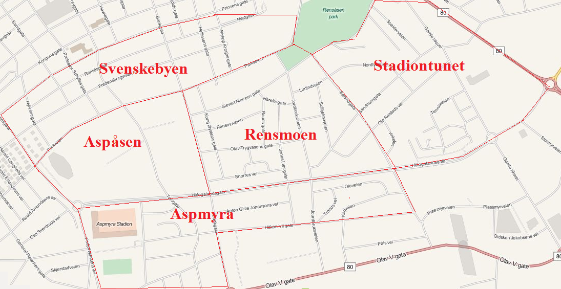 Kartet viser strøkene i bydelen Østbyen i Bodø. Kartet er hentet fra